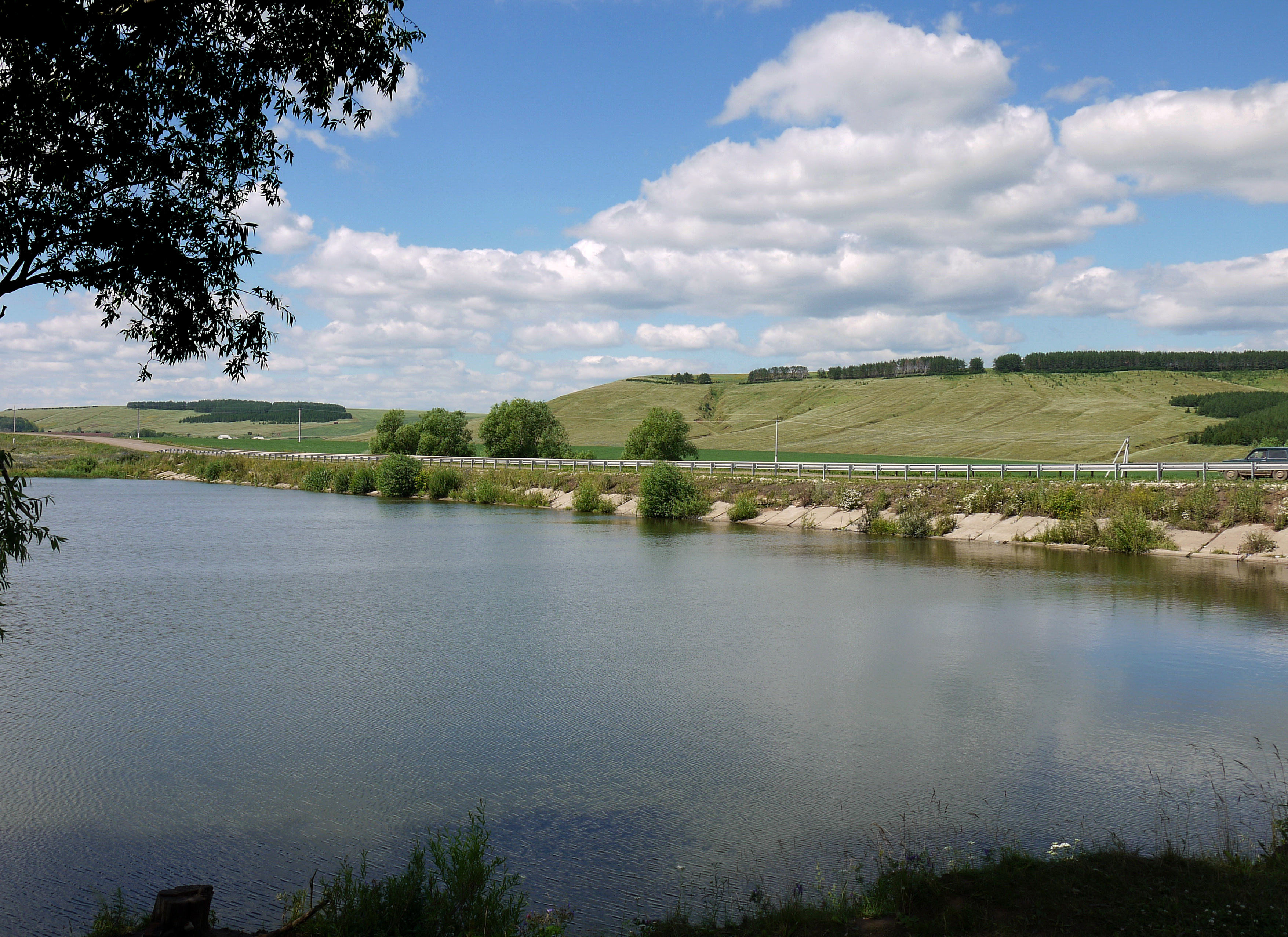 Пруд рядом с Бяйлангер